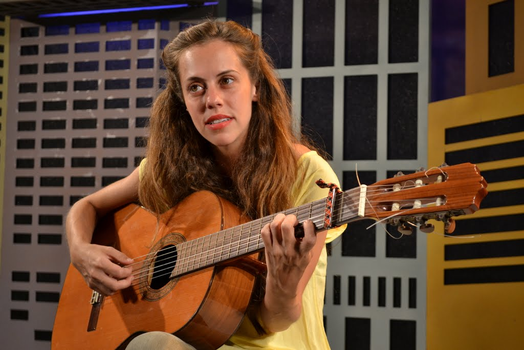 לקפוץ מעל העננים-תאטרון הנפש